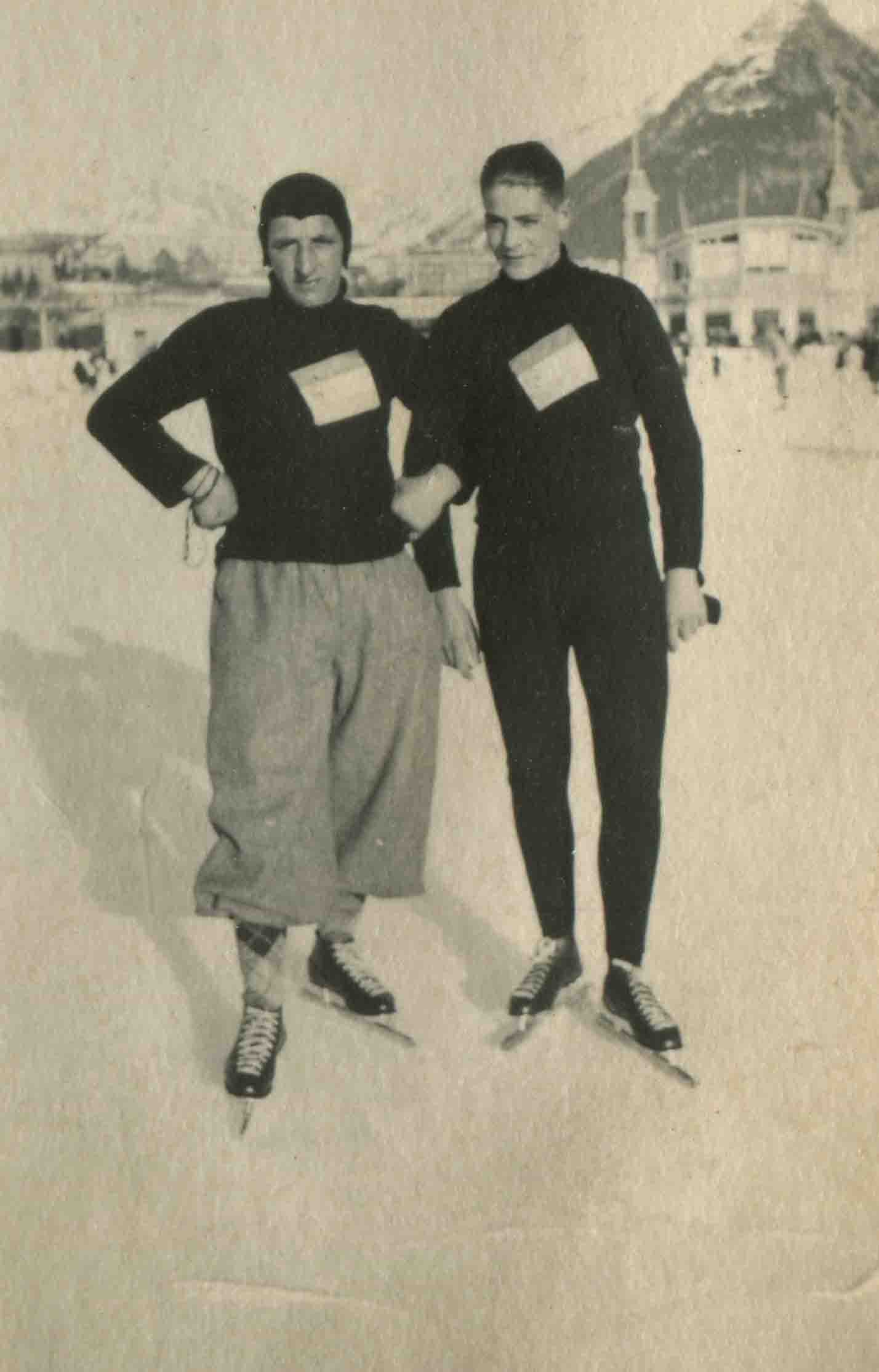 Jacques de Koning sr. (links) als schaatstrainer in Davos